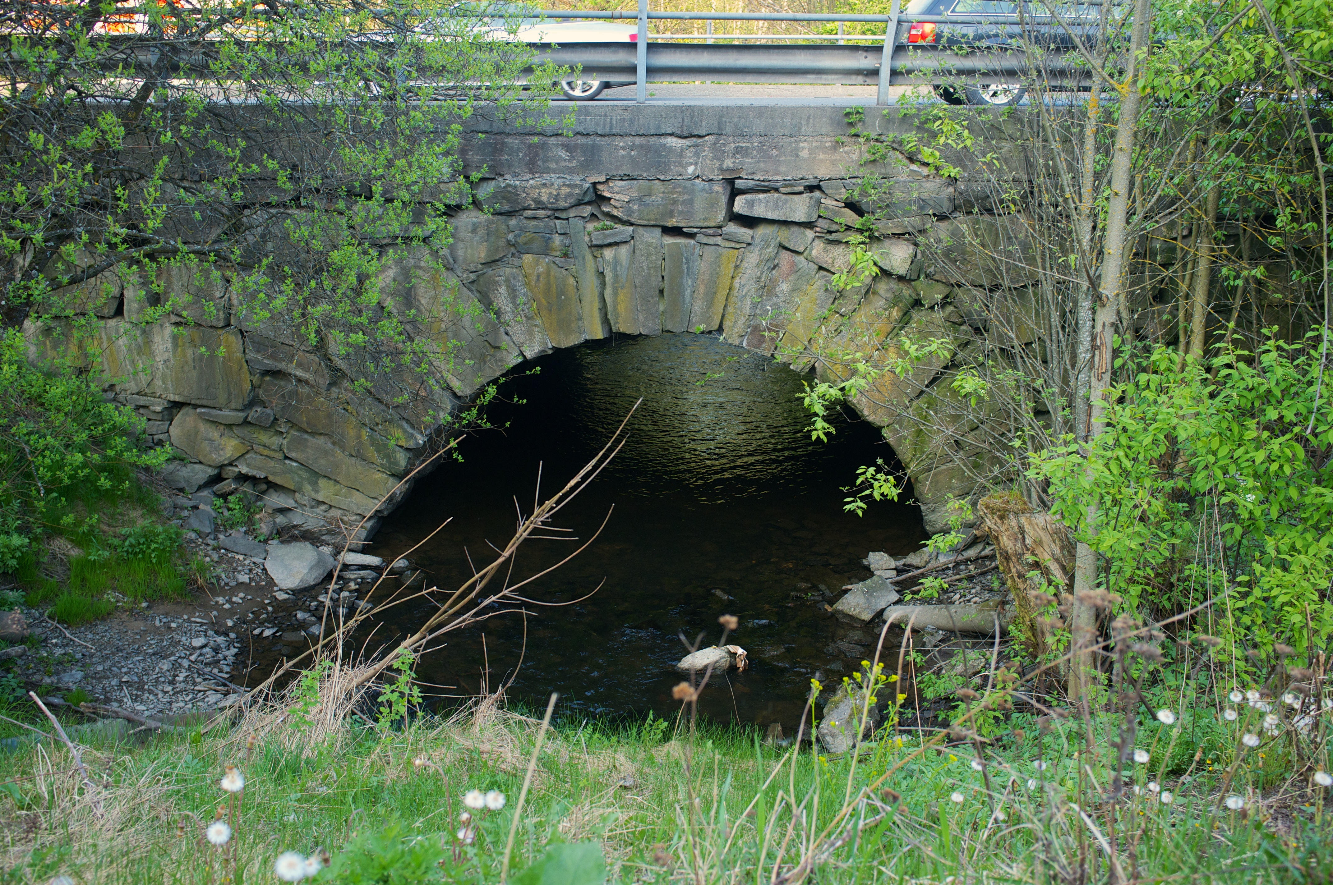 Ljabru i Oslo.